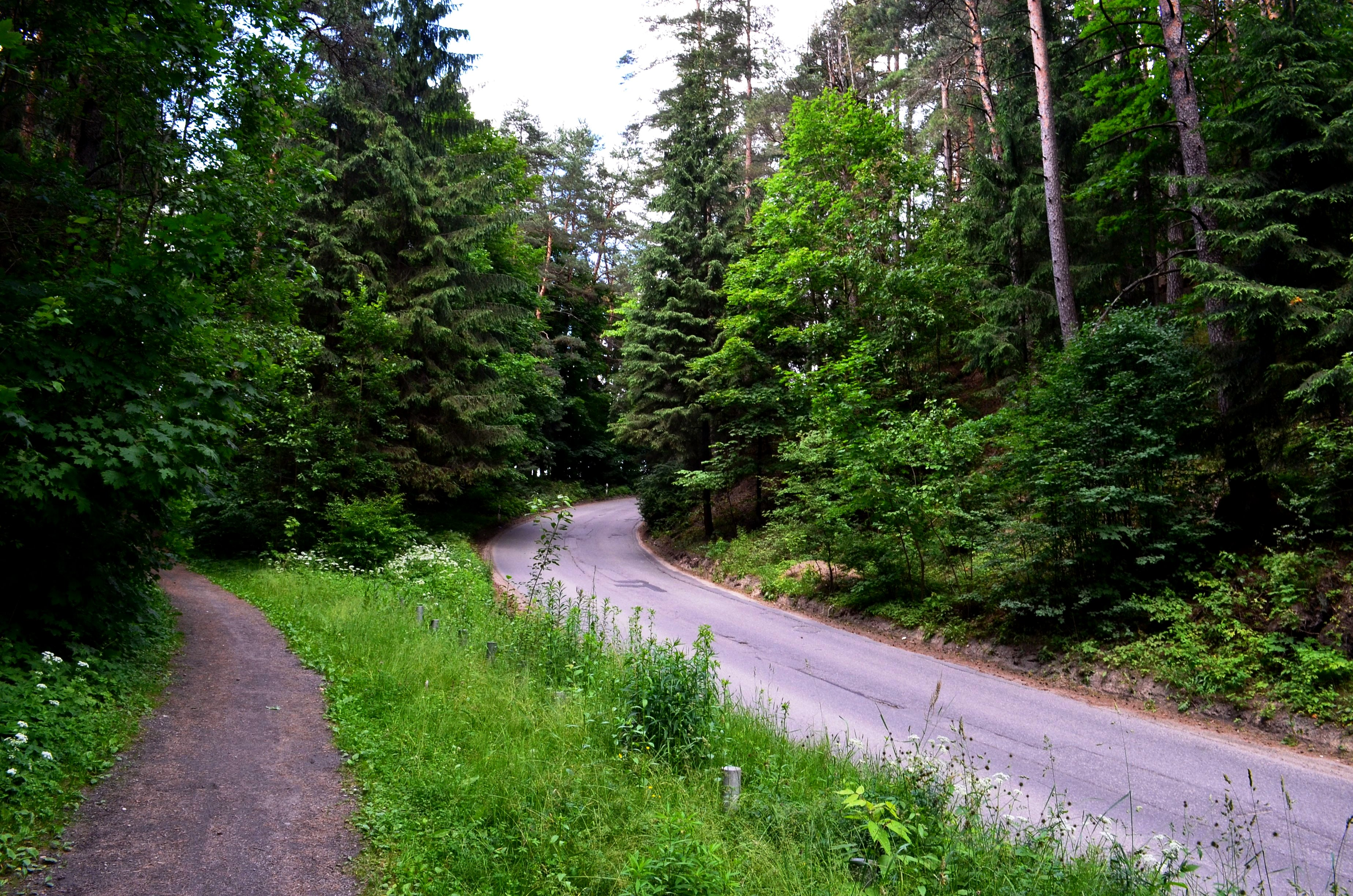 Mileišiškių gatvė, kertanti Pavilnių parką, Vilnius